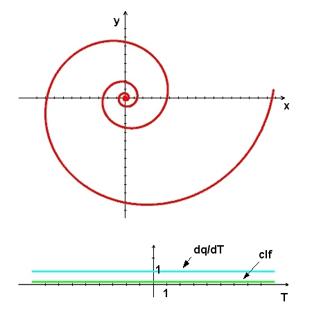 dessin d'une spirale et de la représentation de sa forme